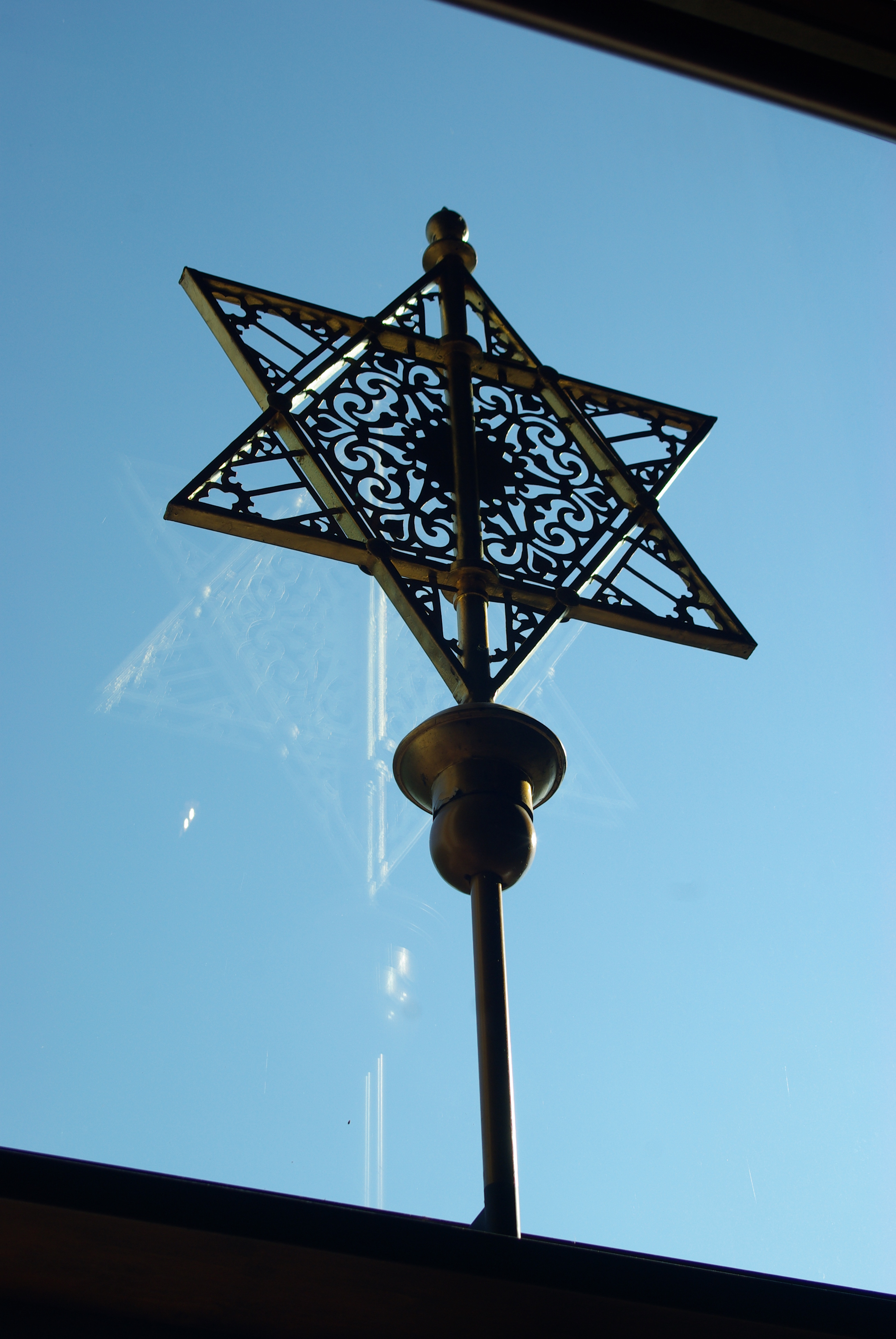 Geretter Davidstern der alten Synagoge Dresden im Eingangsbereich der Neuen Synagoge